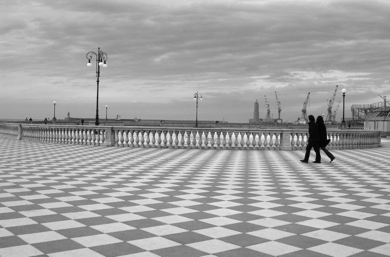 Livorno: veduta della Terrazza Mascagni, sul lungomare della città, realizzata a partire dagli anni venti del XX secolo.